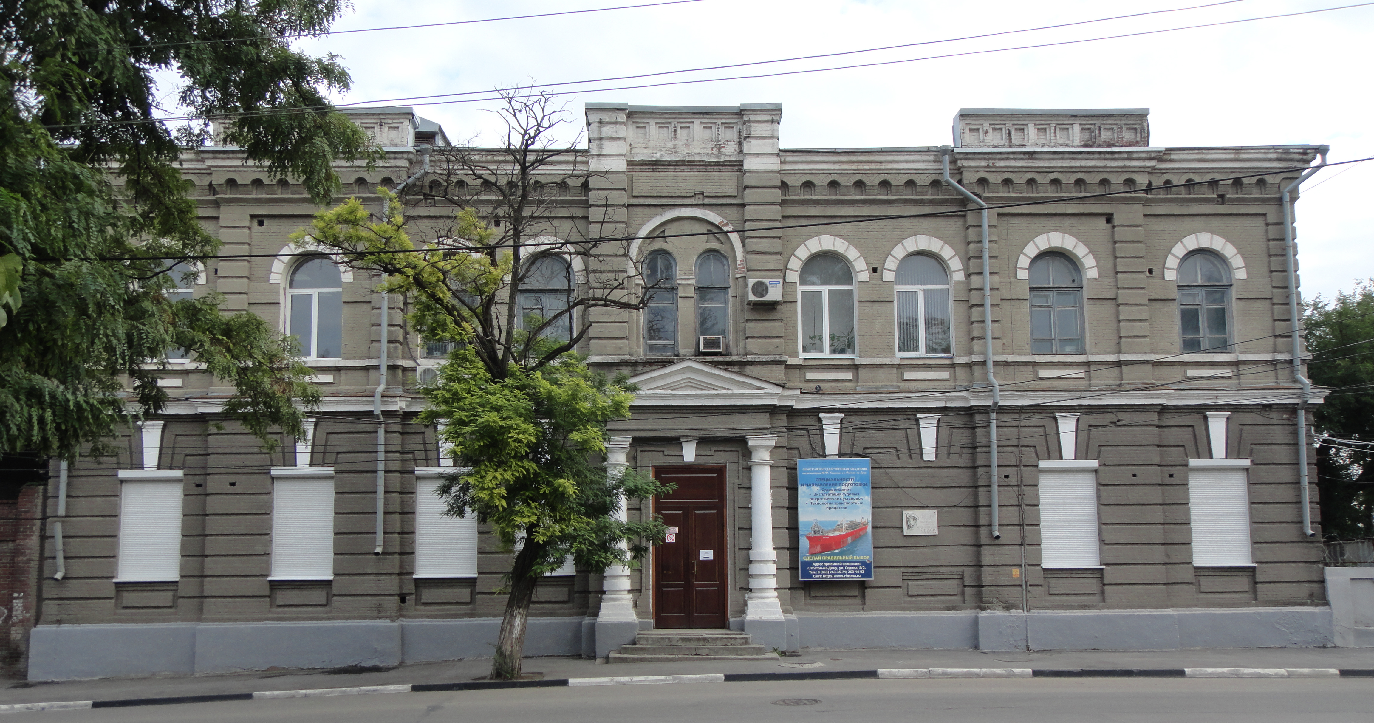 Здание ростовских мореходных классов. здесь учился полярный исследователь г. я. седов (Ростовская область, Ростов-на-Дону, седова улица, 8/2)